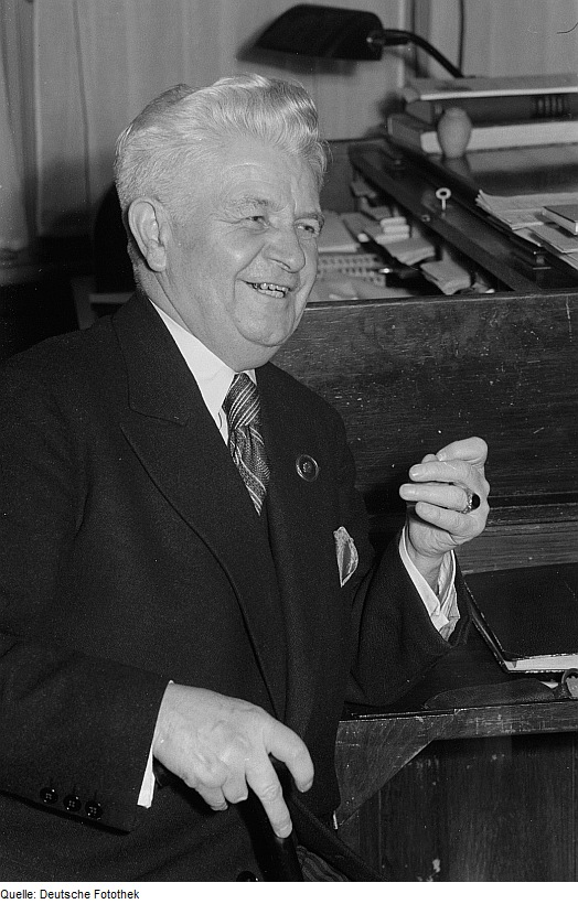 Original image description from the Deutsche Fotothek Porträt des Leipziger Zoodirektors Karl Max Schneider